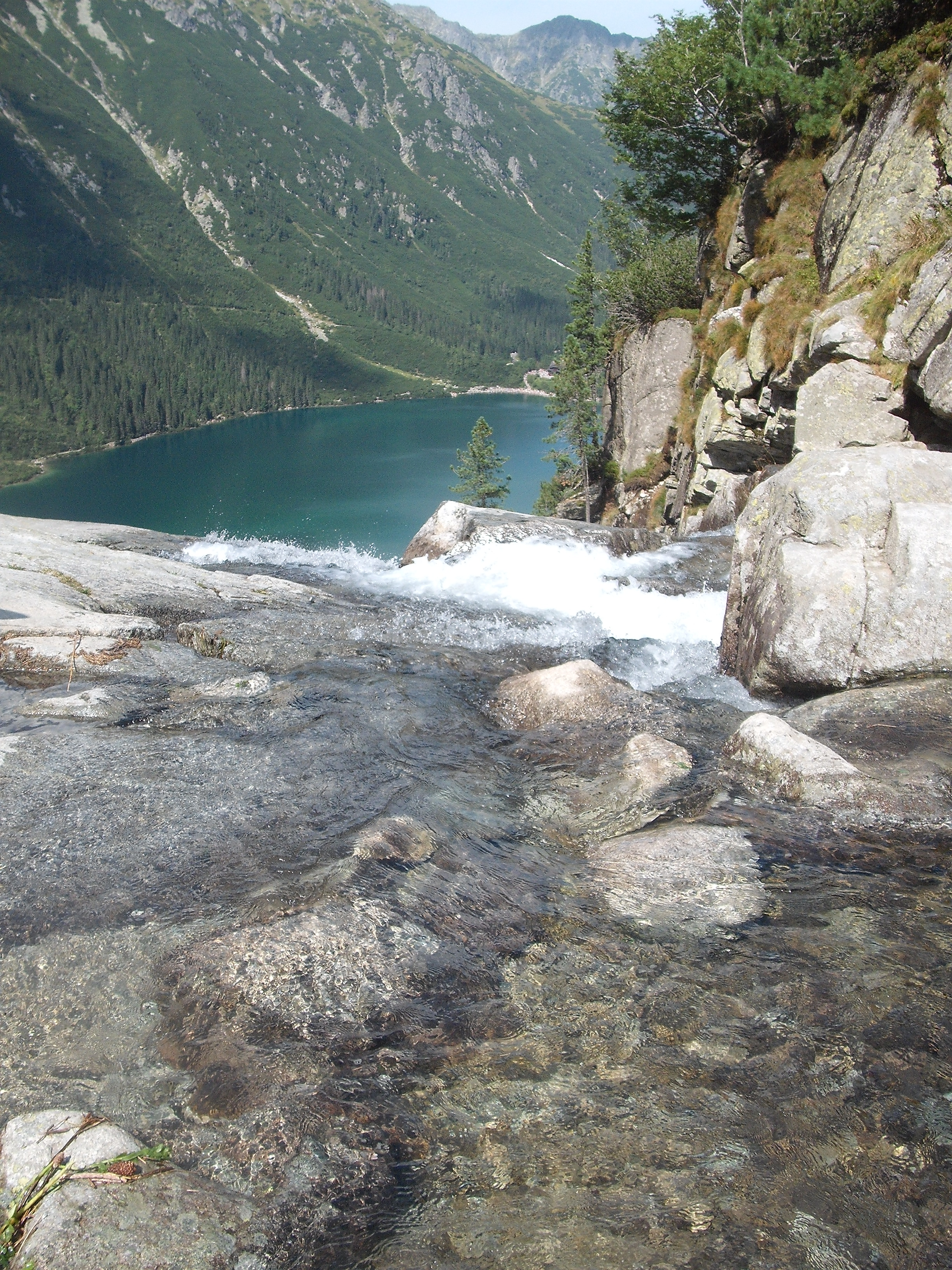 Czarny Staw Pod Rysami This is a photography of Natura 2000 protected area with ID PLC120001